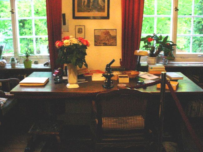 Ernst Jüngers Schreibtisch im Jünger Haus in Wilflingen, Kreis Biberach.